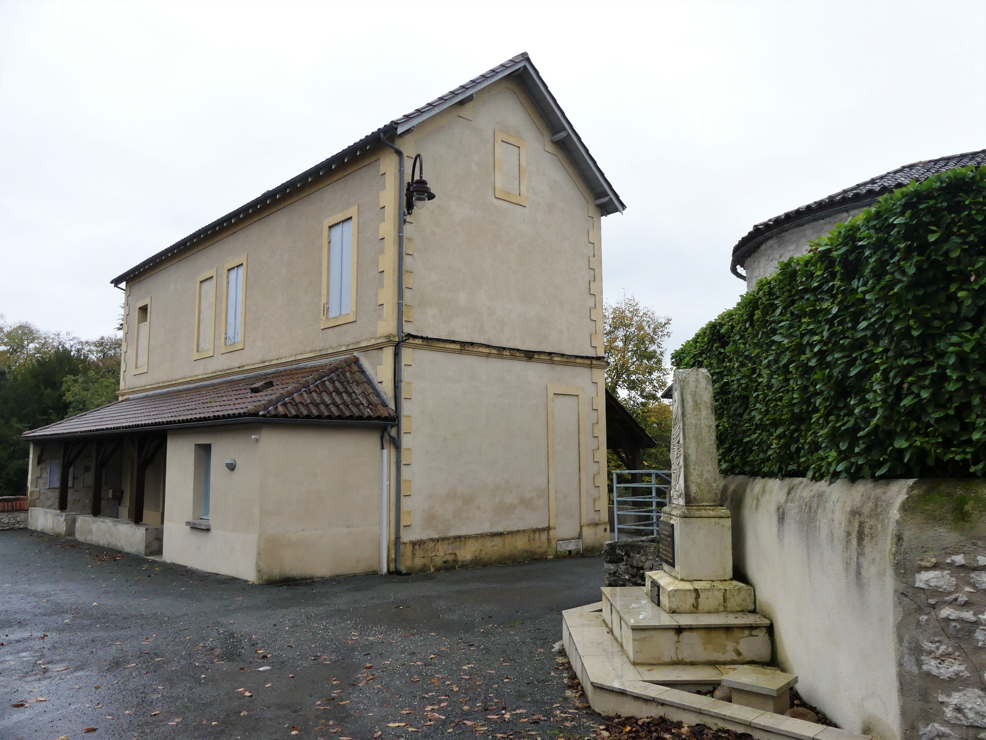 La mairie de Sainte-Eulalie-d'Eymet, Dordogne, France.